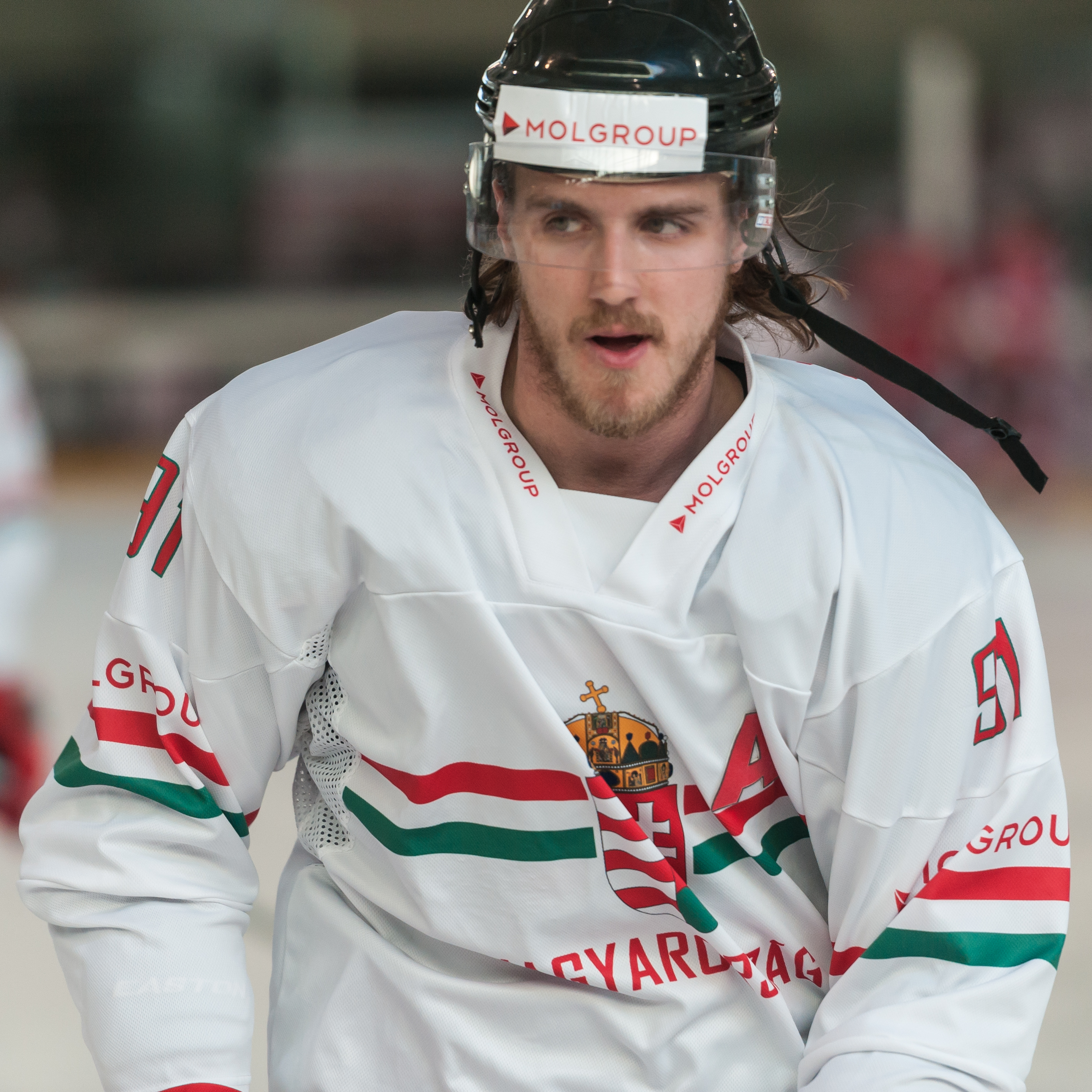 Freundschaftliches Eishockey-Laenderspiel - Oesterreich vs Ungarn. Bild zeigt Gergoe Nagy (HUN).